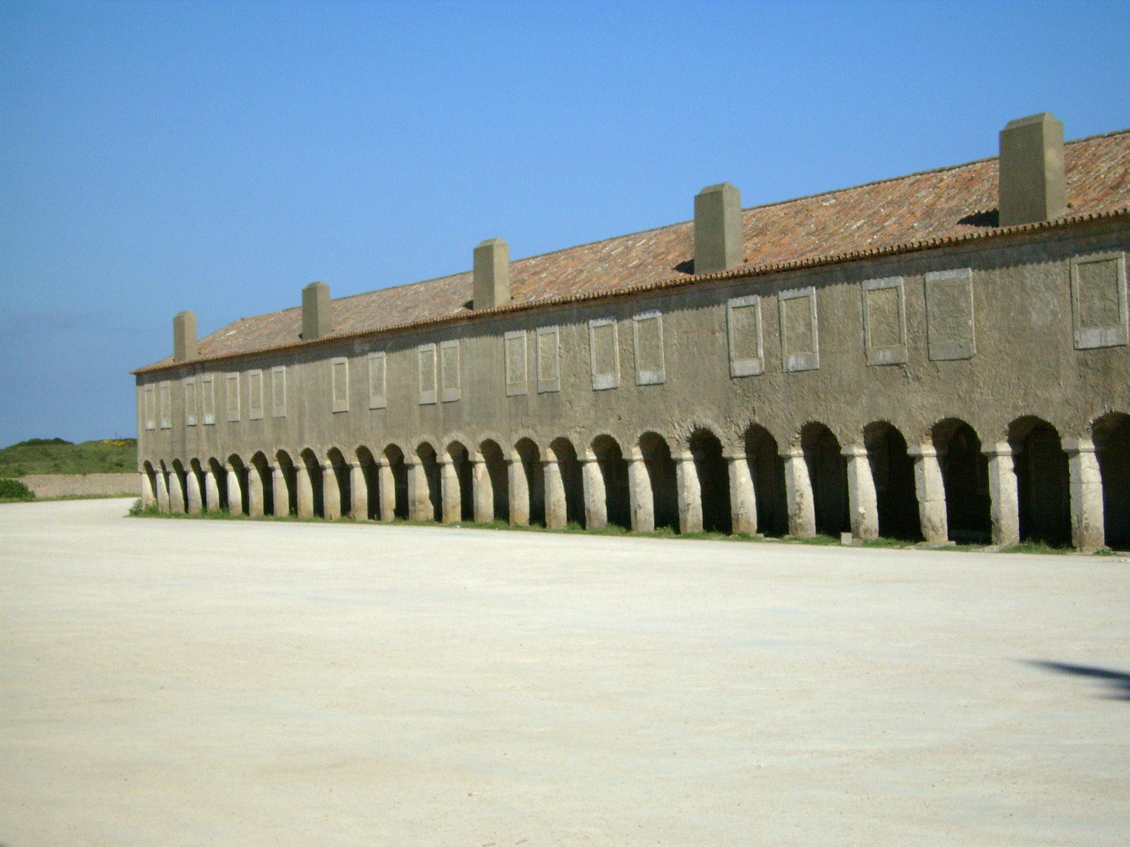 De cada lado da Igreja de Nossa Senhora do Cabo há uma fila de alojamentos para peregrinos. Chamada de Casa dos Círios ou simplesmente hospedarias que formam o Terreiro no Cabo Espichel. Local : Cabo Espichel / Sesimbra / Portugal user:sacavem (pt) (usuário:sacavem)